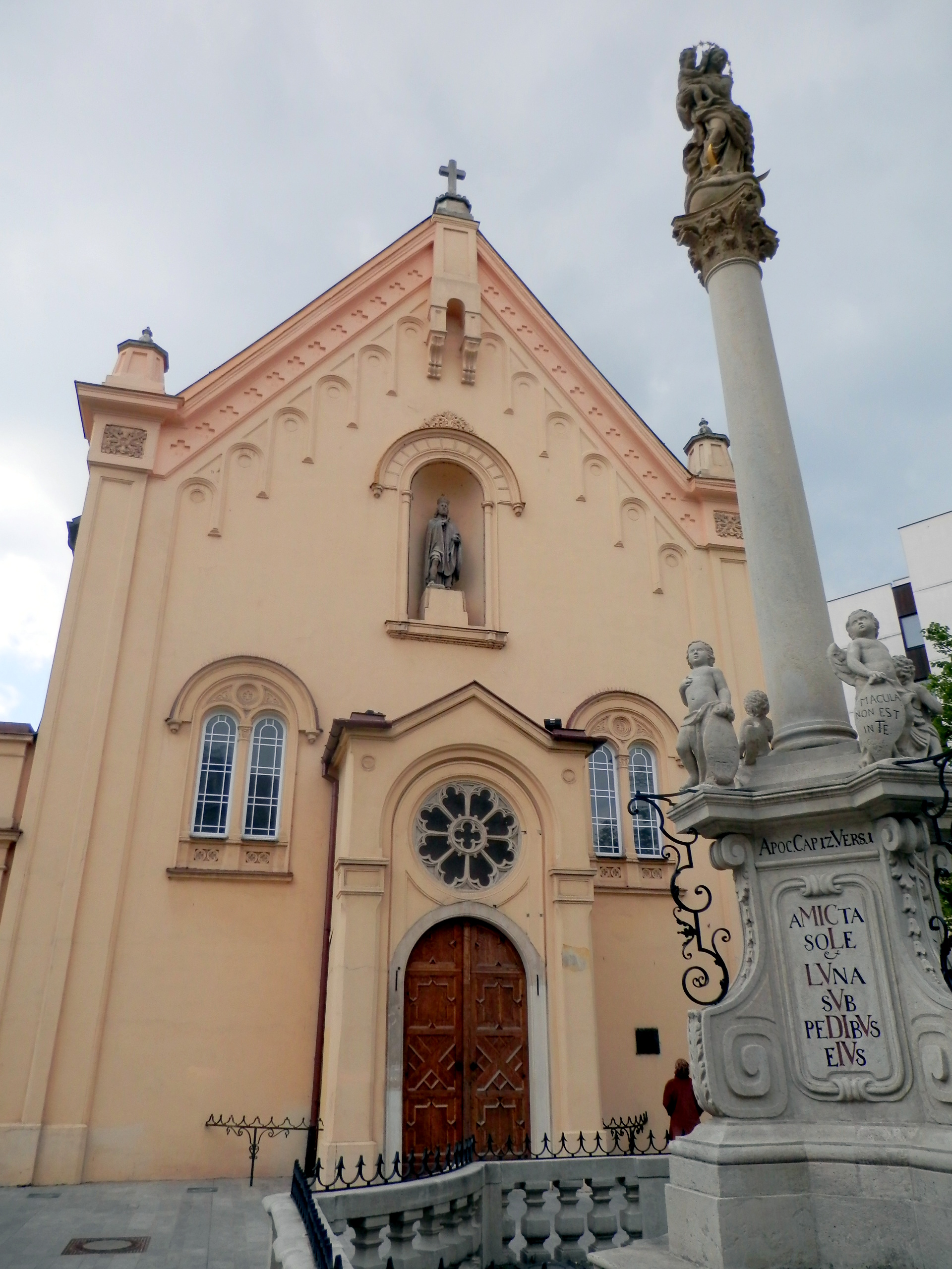 Kostol a kláštor kapucínov. Župné námestie v Bratislave.